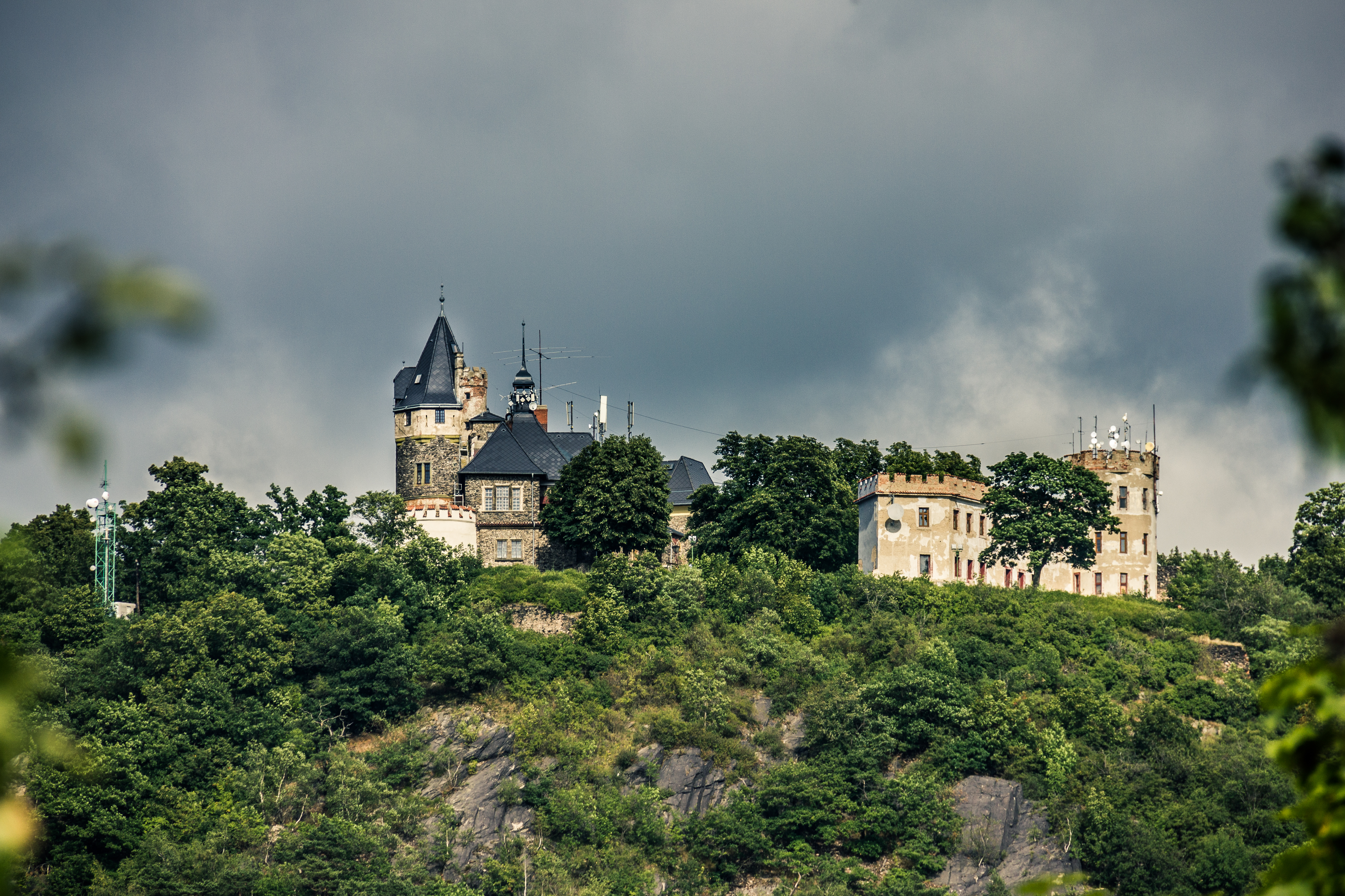 Hrad Doubravská hora, Doubravská hora, Trnovany čp. 104, Teplice.